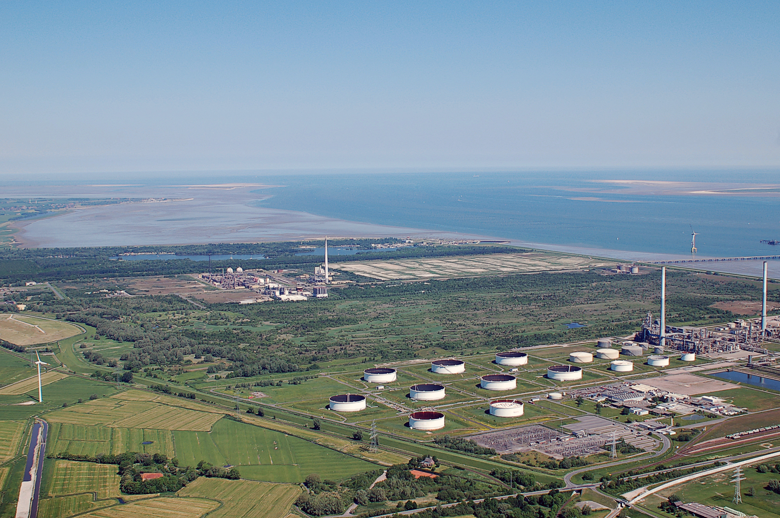 Luftbilder von der Nordseeküste 2012-05